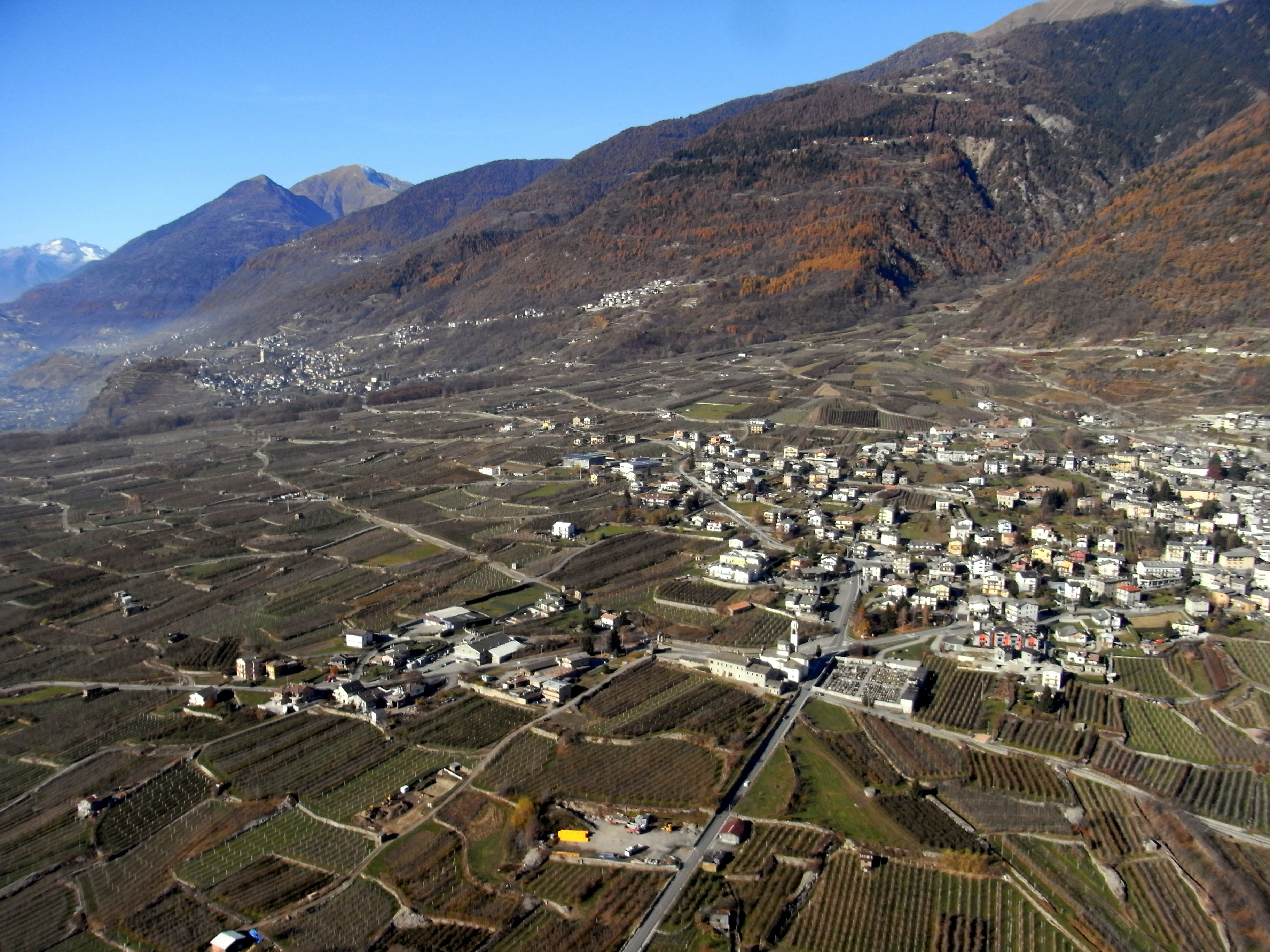 Ponte